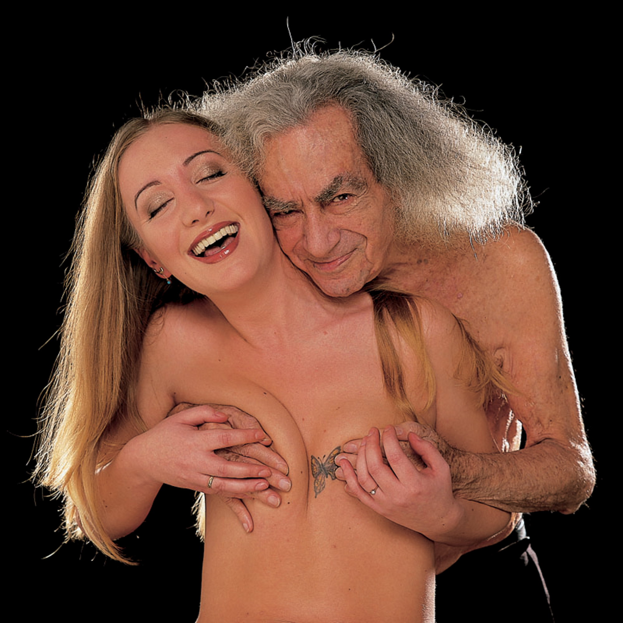 Faludy György és felesége, Kovács Fanny